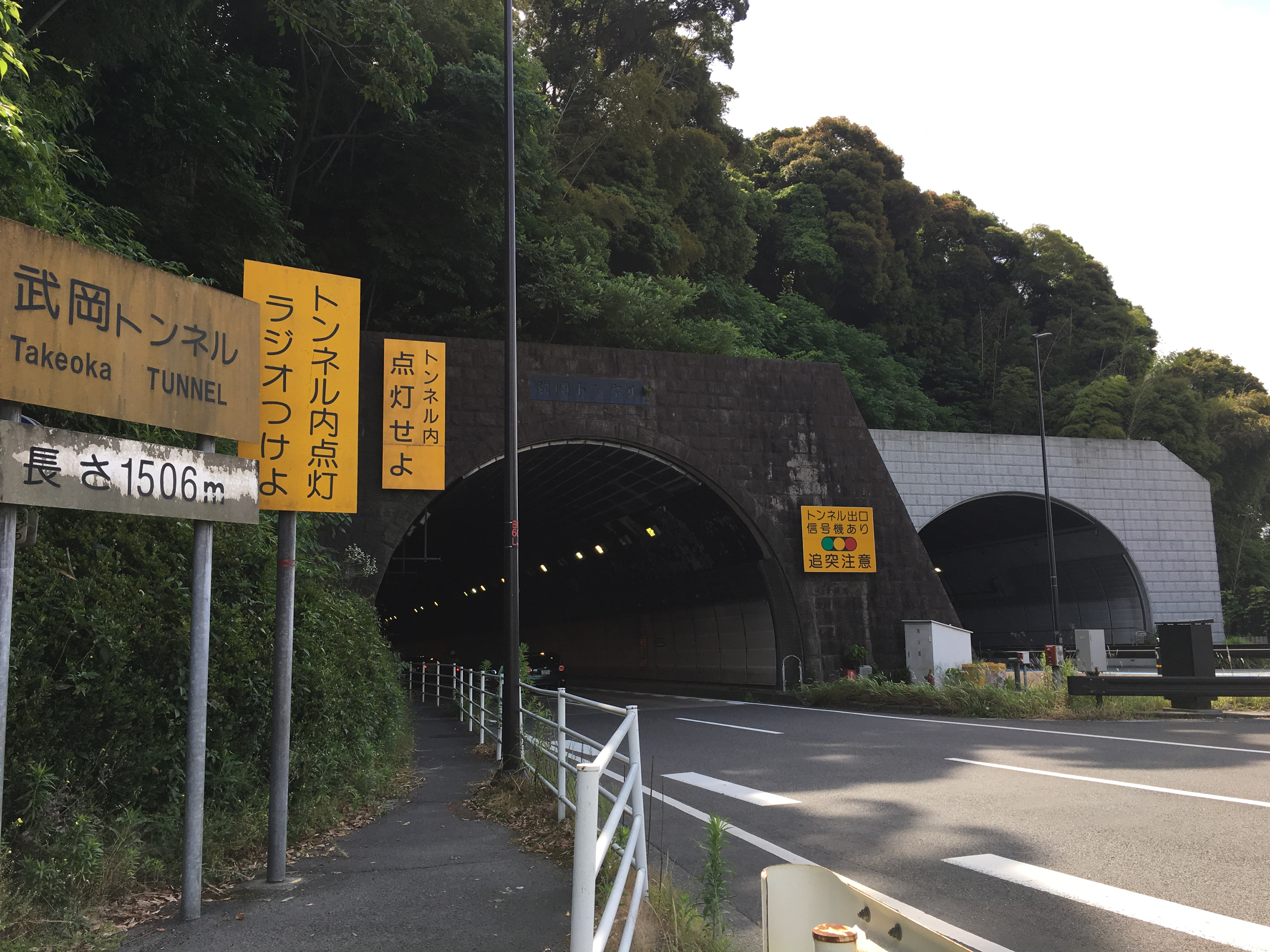 武岡トンネルを鹿児島インターチェンジ側入口から撮影。